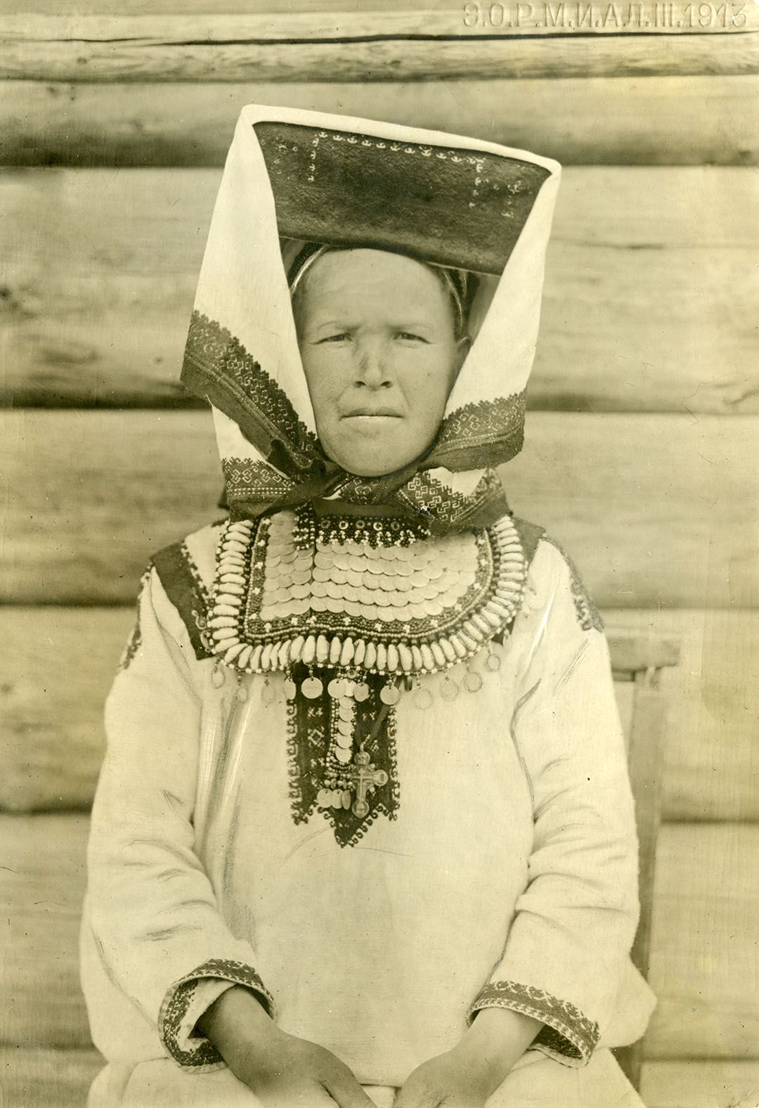 Марийский женский головной убор сорока, покрытый платком сюлык. Вятская губ., Яранский у., Ернурская вол., д. Кёрды